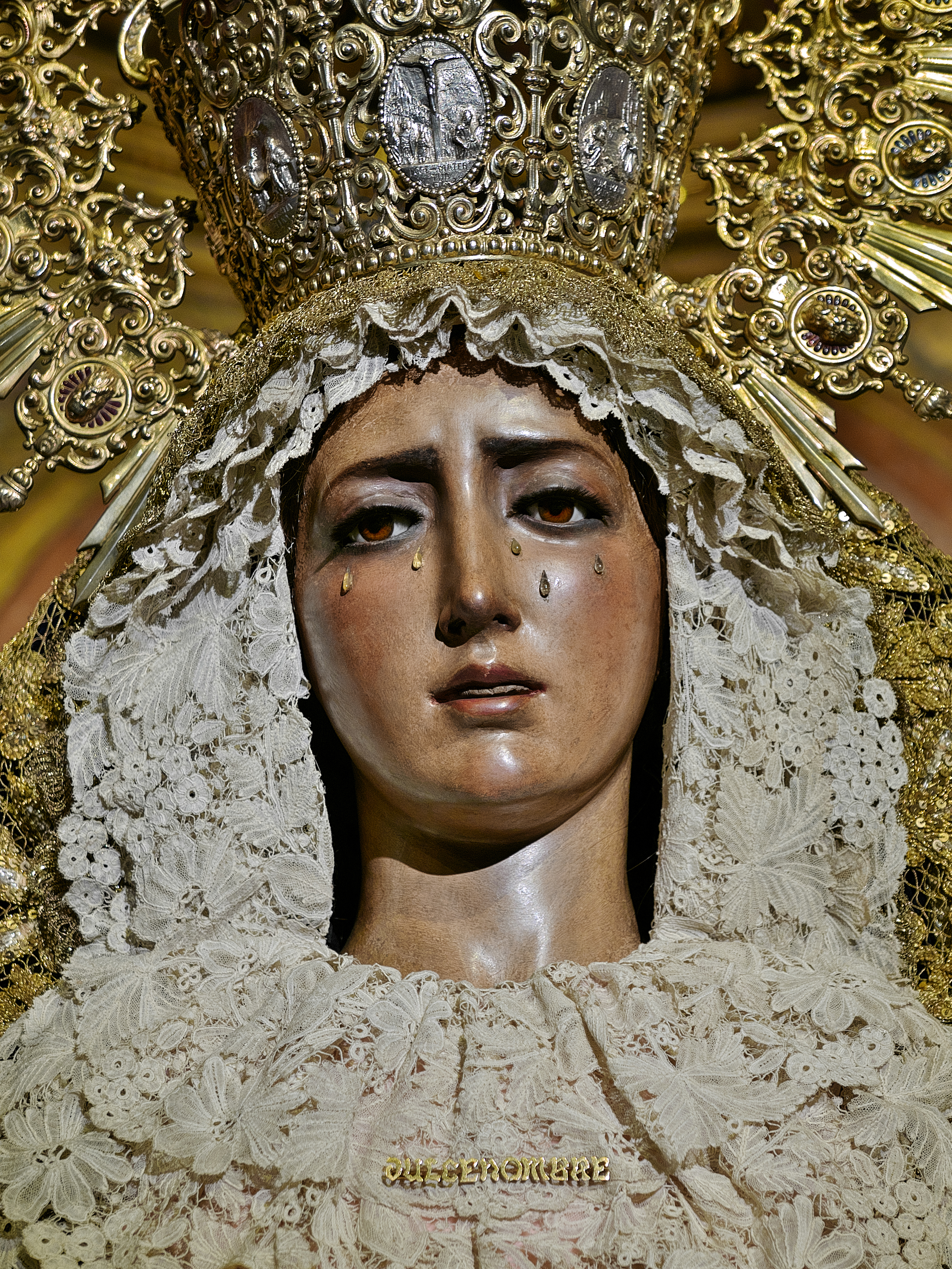 Hermandad del Dulce Nombre. Primera dolorosa procesional de Antonio Castillo Lastrucci (1924)